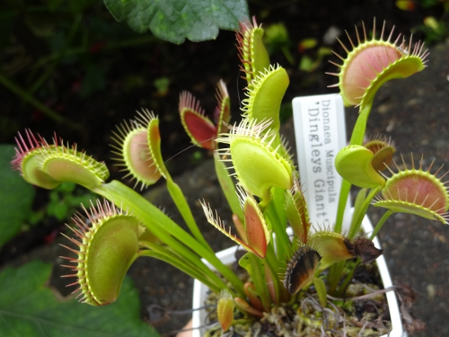 Dionaea Muscipula "Dingleys Giant"